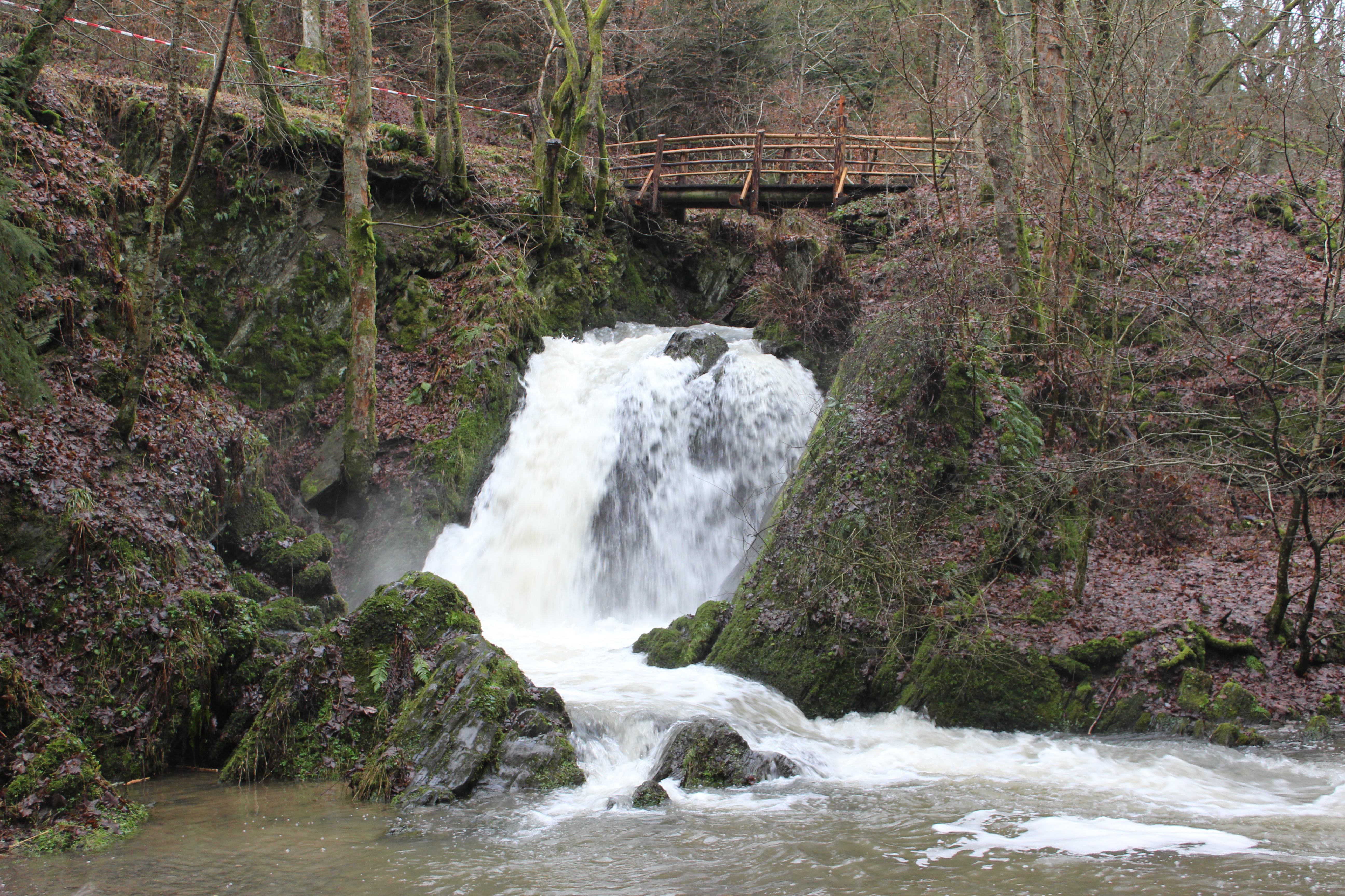 7m hoher Wasserfall im Endertal "Die Rausch"